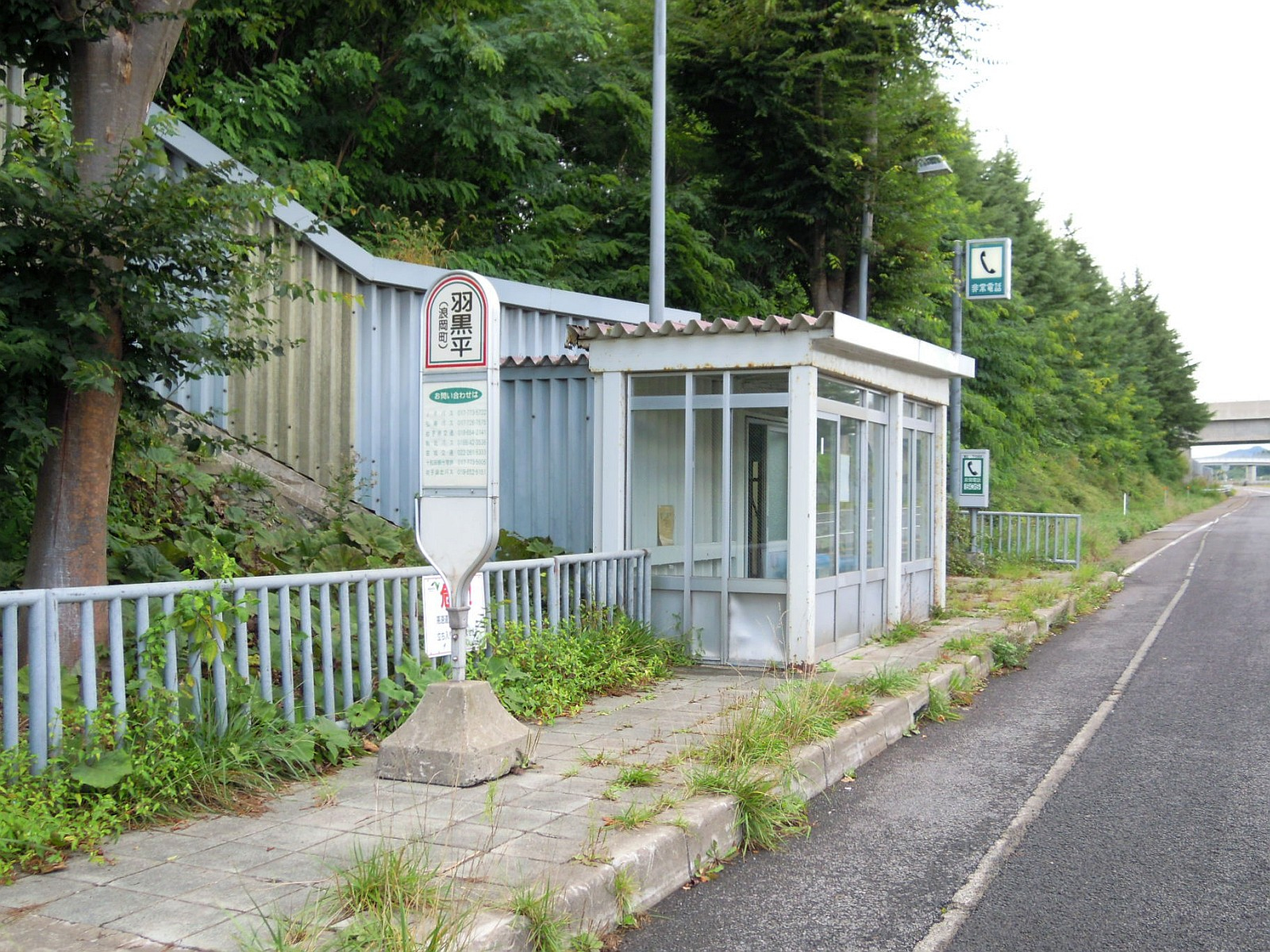 東北自動車道に設置されている羽黒平バスストップ（下り線側）